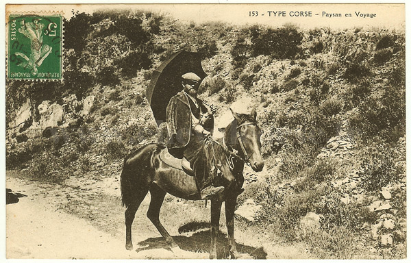 Le cheval corse etait le principal moyen de transport a travers l'île